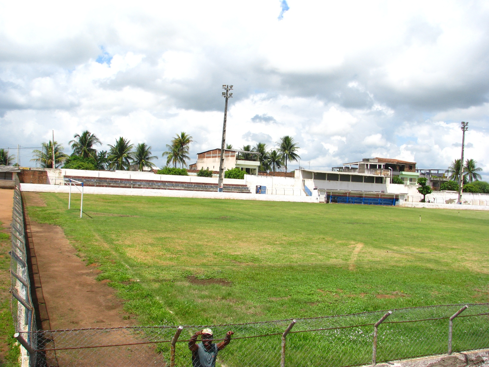 Foto tirada da arquibancada frontal as cabines de imprensa.